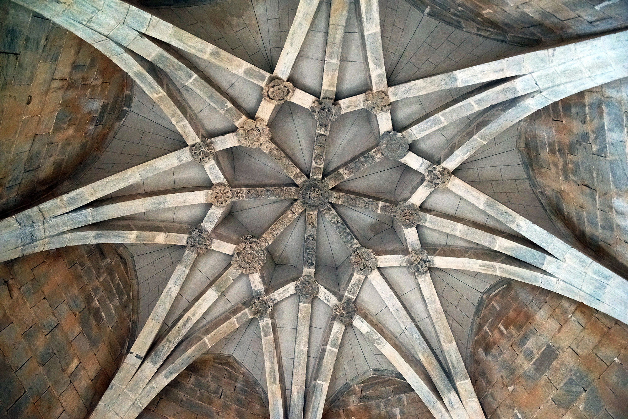 BEJA BEJA (Wiki)